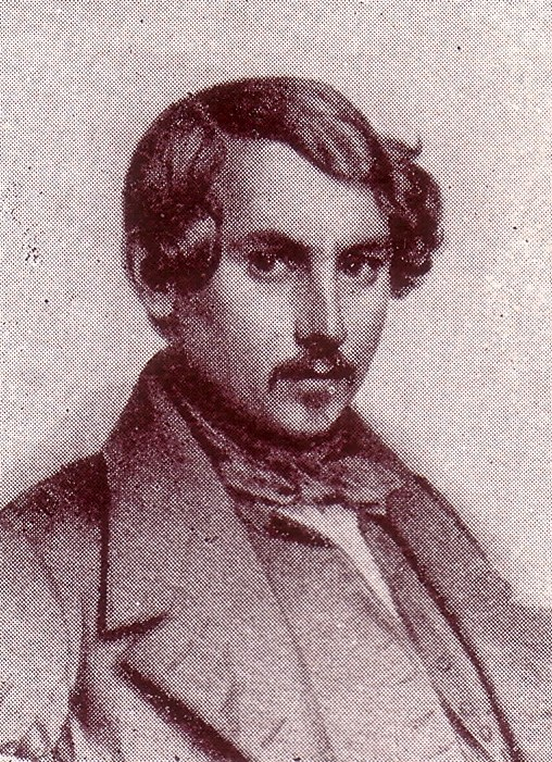 Anton von Krosigk als Bonner Preuße